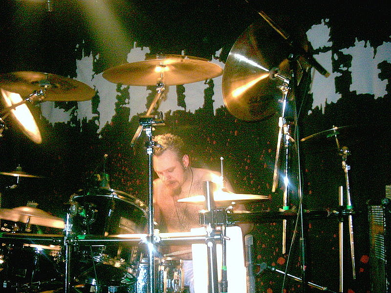 Richard Evensand Chimaira 2004 Berlin